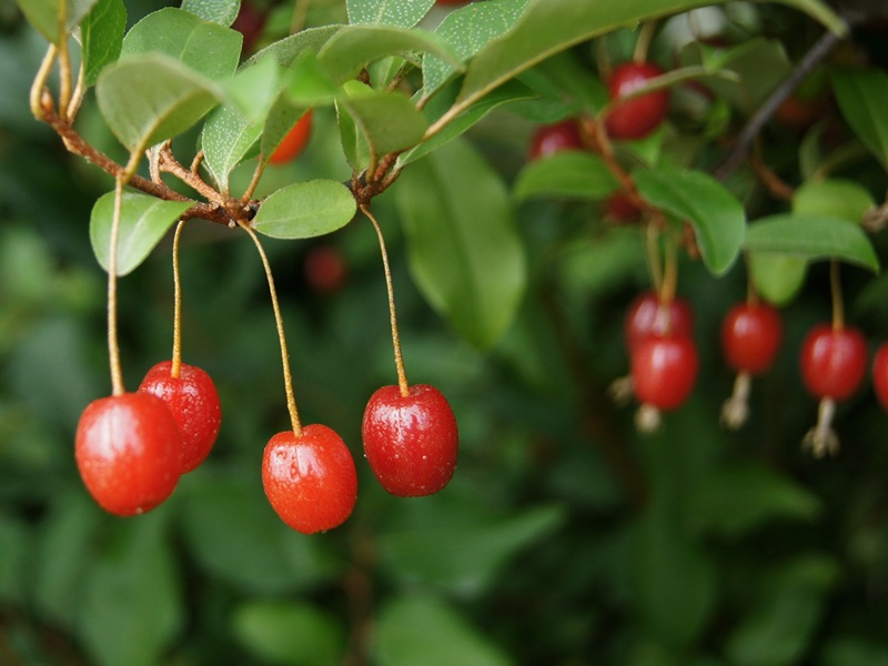 Elaeagnus multiflora